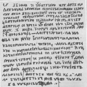 An Abur, i.e. Old Permic script document.